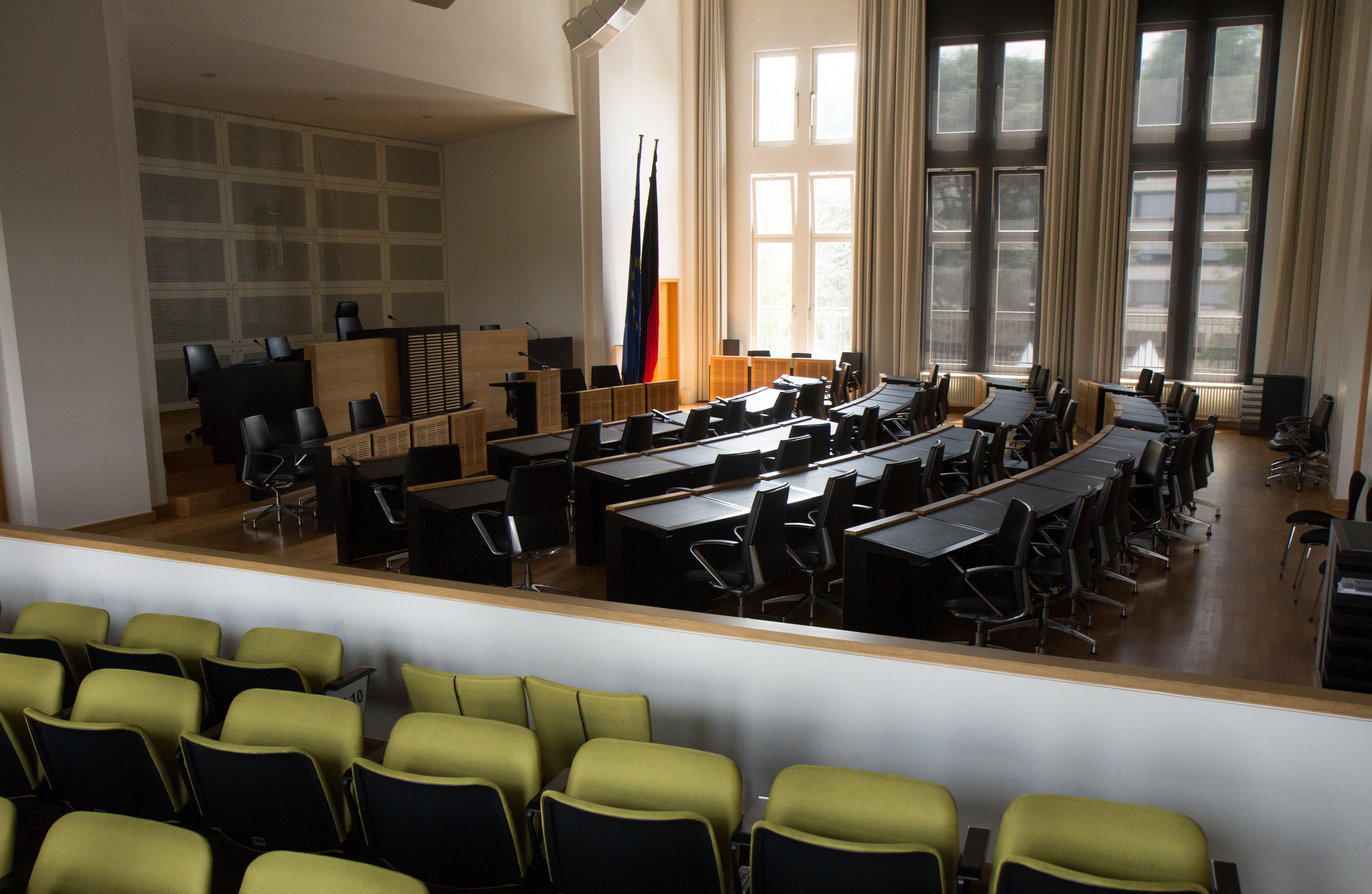 Plenarsaal im Landtag des Saarlandes